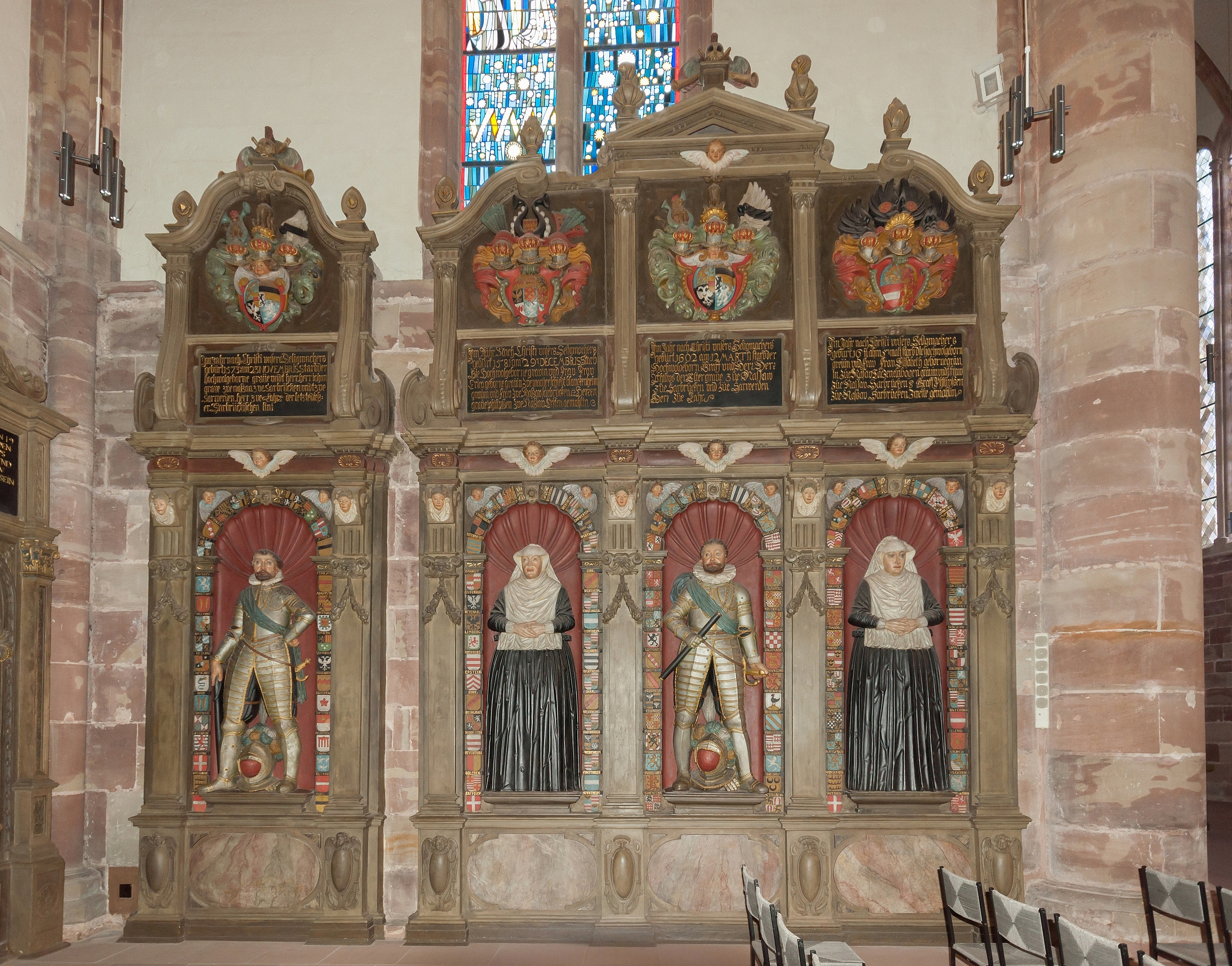 Grabmäler im Seitenschiff der Stiftskirche St. Arnual in Saarbrücken.